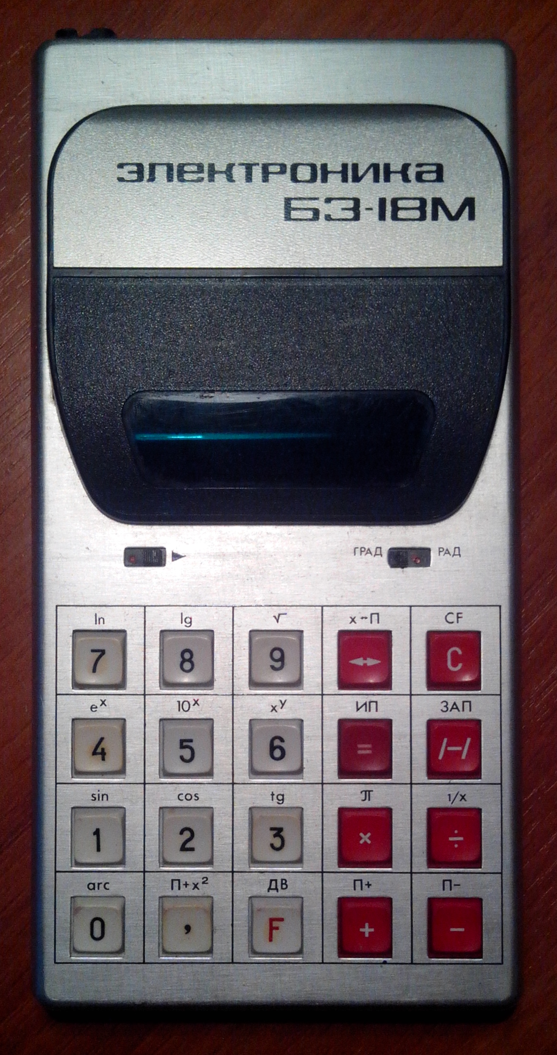 Советский калькулятор «Электроника Б3-18М» 1985 года выпуска.